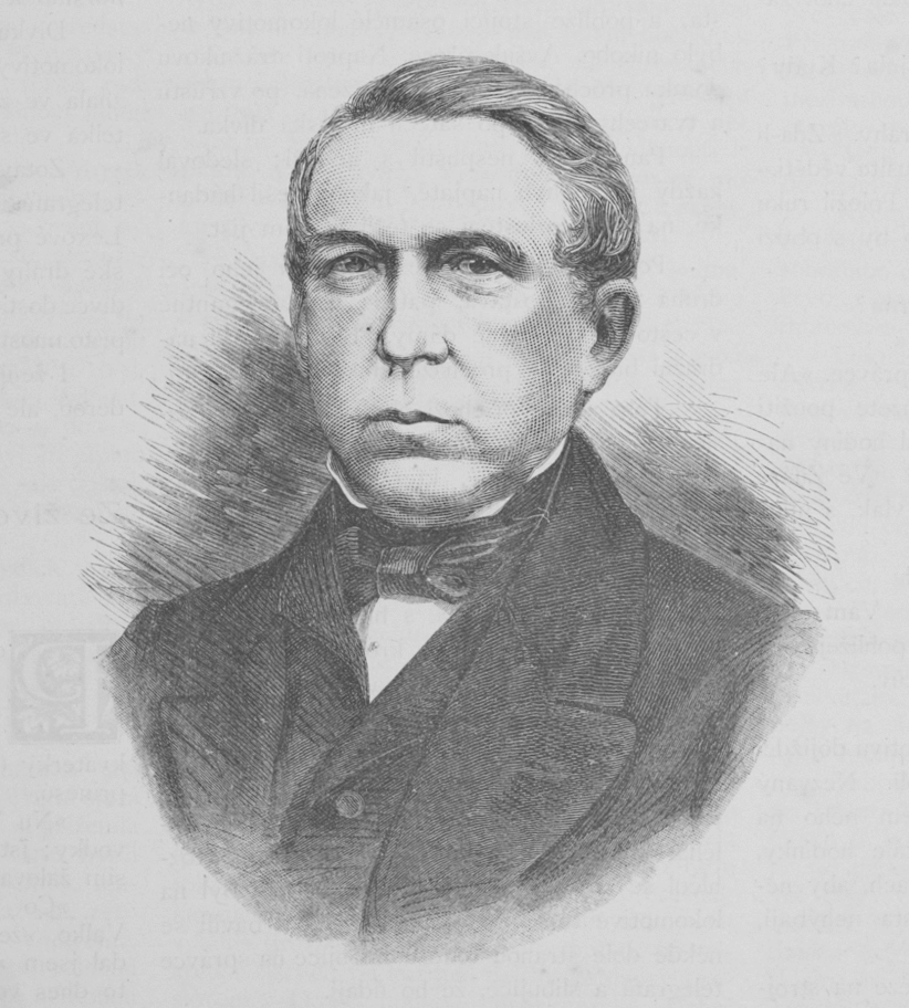 Hornjoserbsce: Handrij Zejler; serbski basnik, załožer serbskeje narodneje literatury.